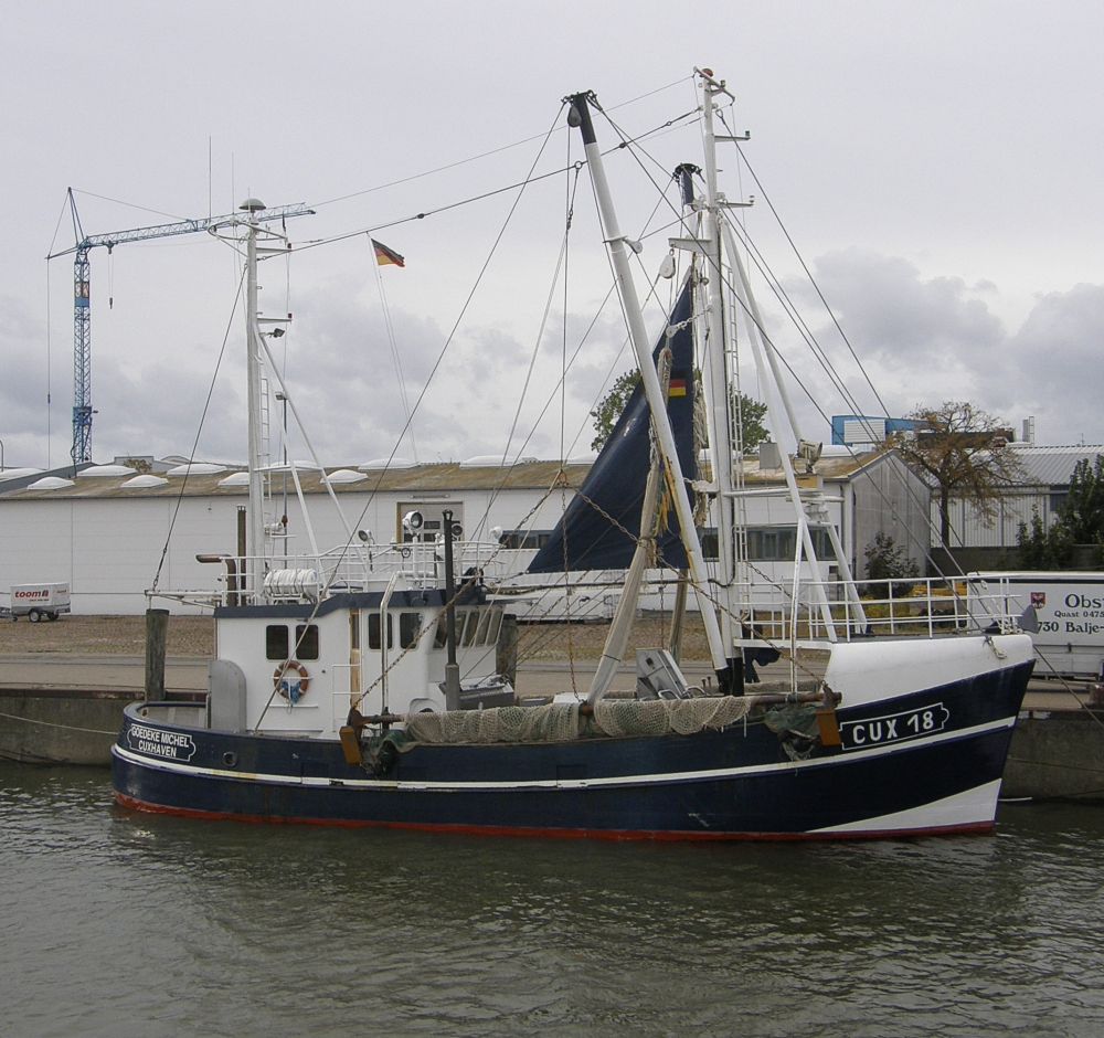 Krabbenkutter CUX 18 Goedeke Michel im Hafen